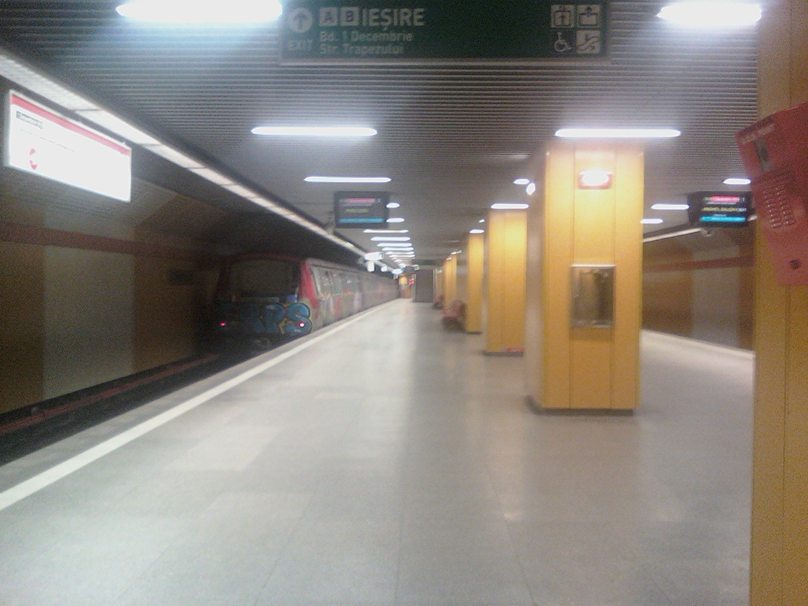 Stația de metrou 1 decembrie 1918 din București.